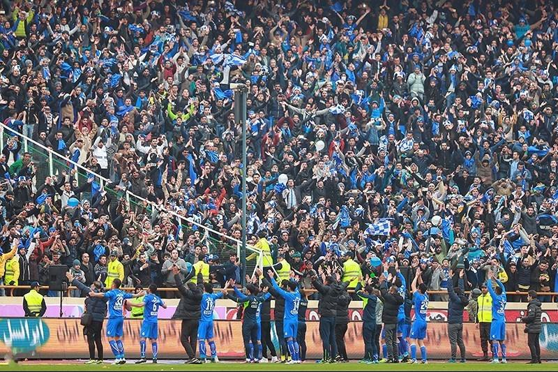 Esteghlal Edges Past Persepolis 3-2 to Claim Tehran Derby - TEHRAN (Tasnim) - The 84th Tehran derby between Iran’s professional football teams Persepolis (Reds) and Esteghlal (Blues) held at Azadi Stadium, west of Tehran, with a 3-2 win for Esteghlal.